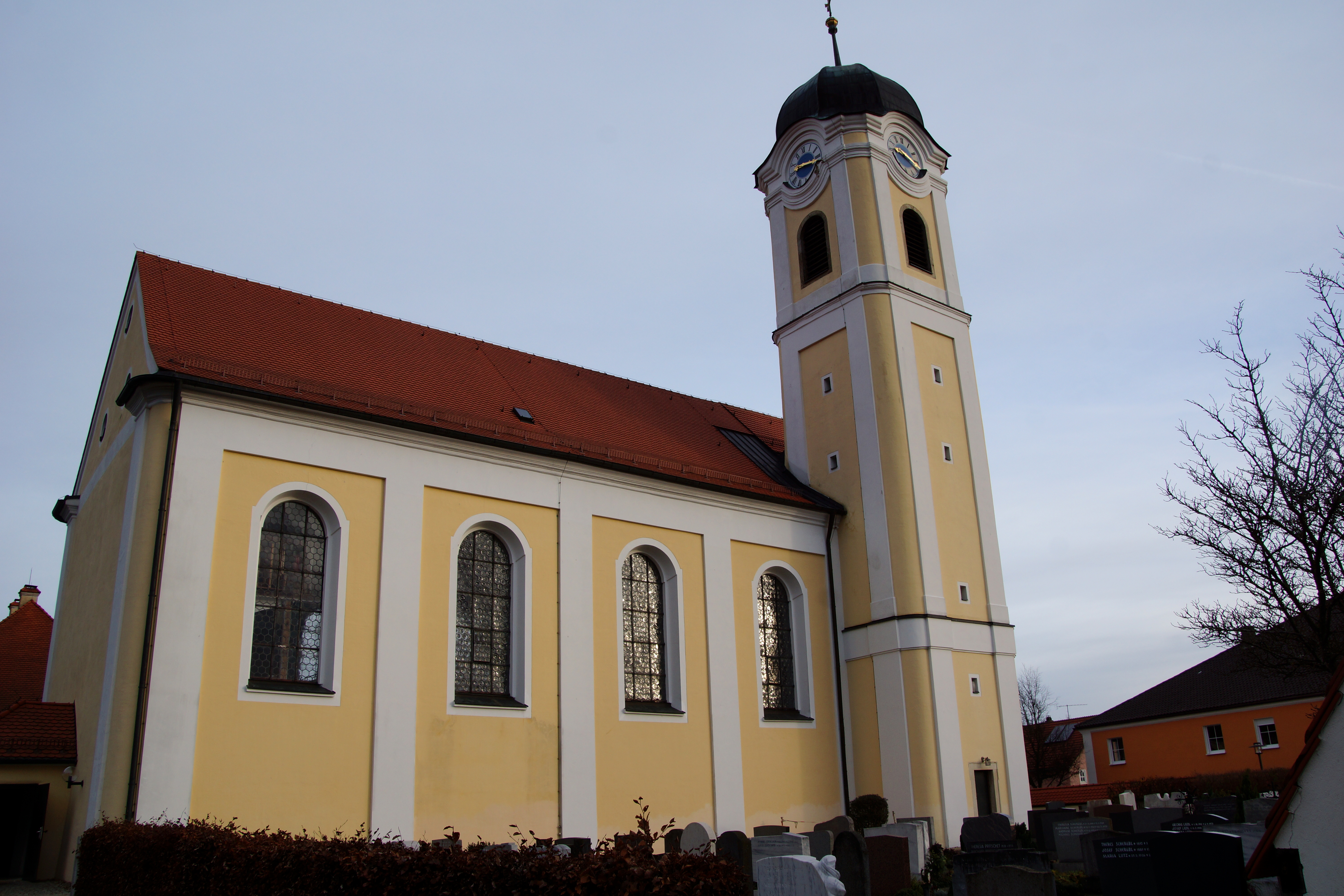 Die katholische Pfarrkirche Mariä Heimsuchung in Hohenschambach bei Hemau